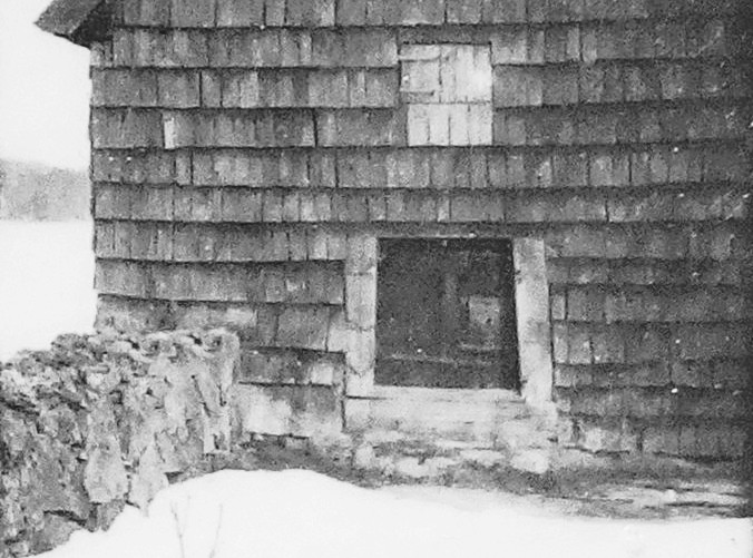 Kyrkboden, Ingatorp innan flytten 1908